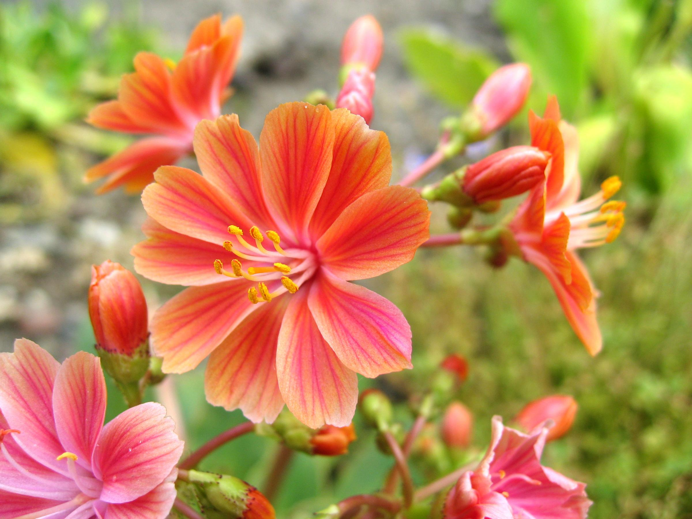 Lewisia cotyledon, rosa/orange